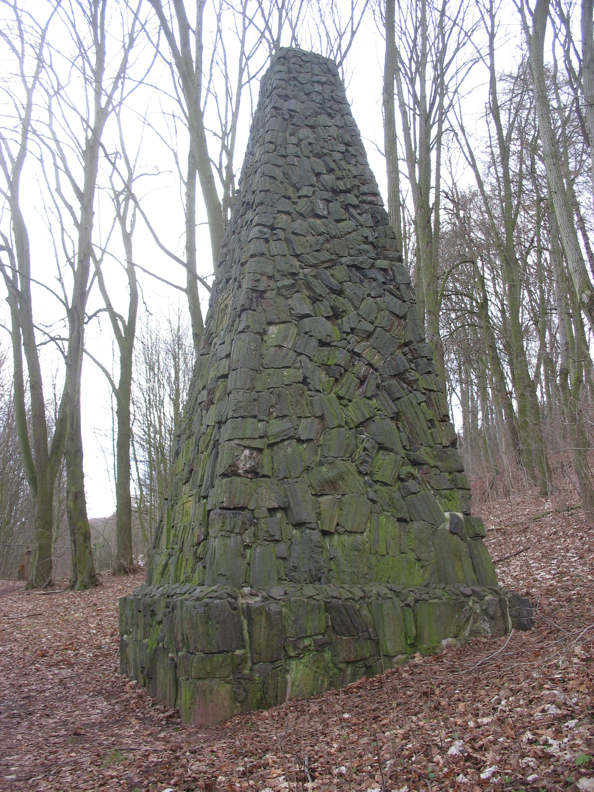 Kelbra (Kyffhäuser) – Hermann-DenkmalThis is a photograph of an architectural monument. 84665